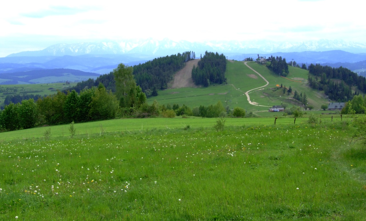 Przełęcz Drzyslawa i góra Wdżar w Gorcach